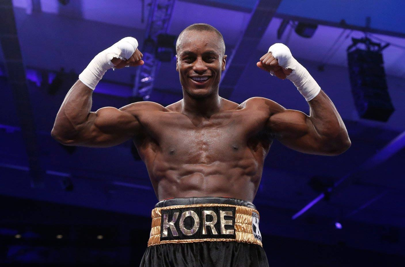 landry kore vinder igen